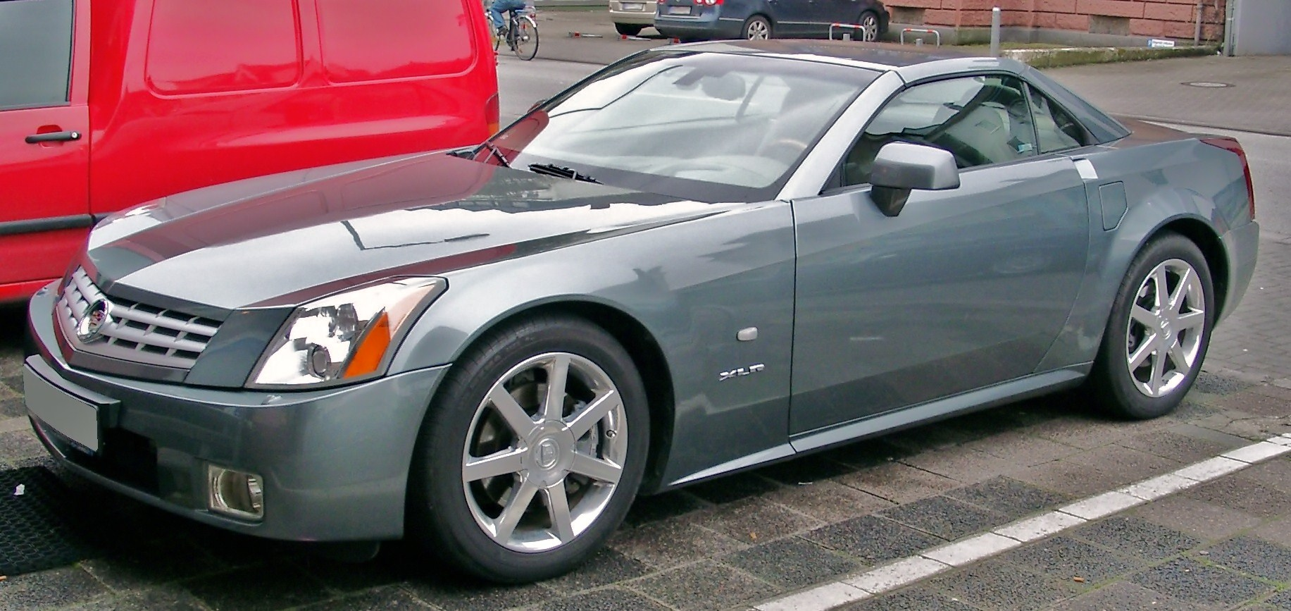 Cadillac XLR